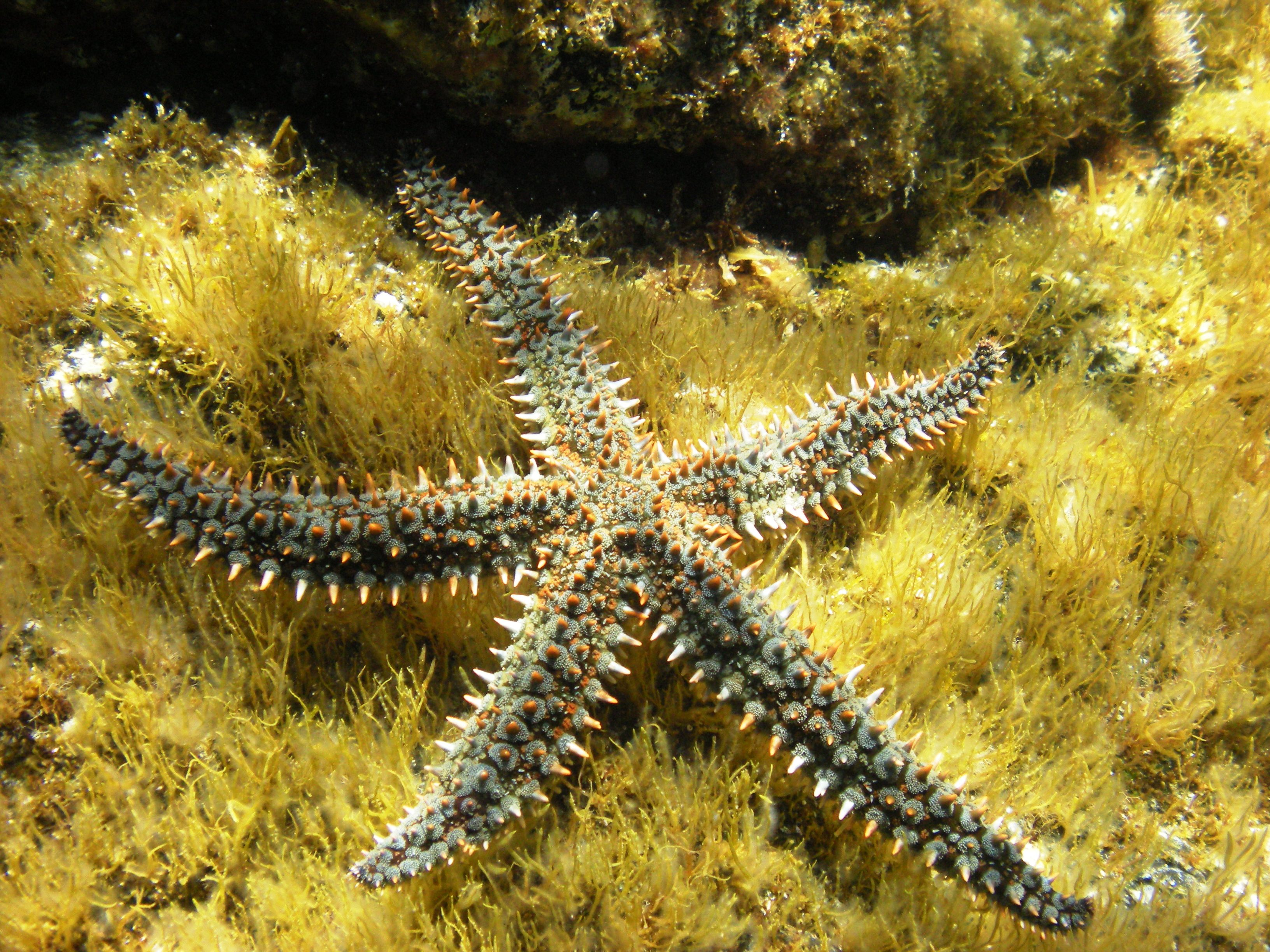 Marthasterias glacialis Linosa, Sicily